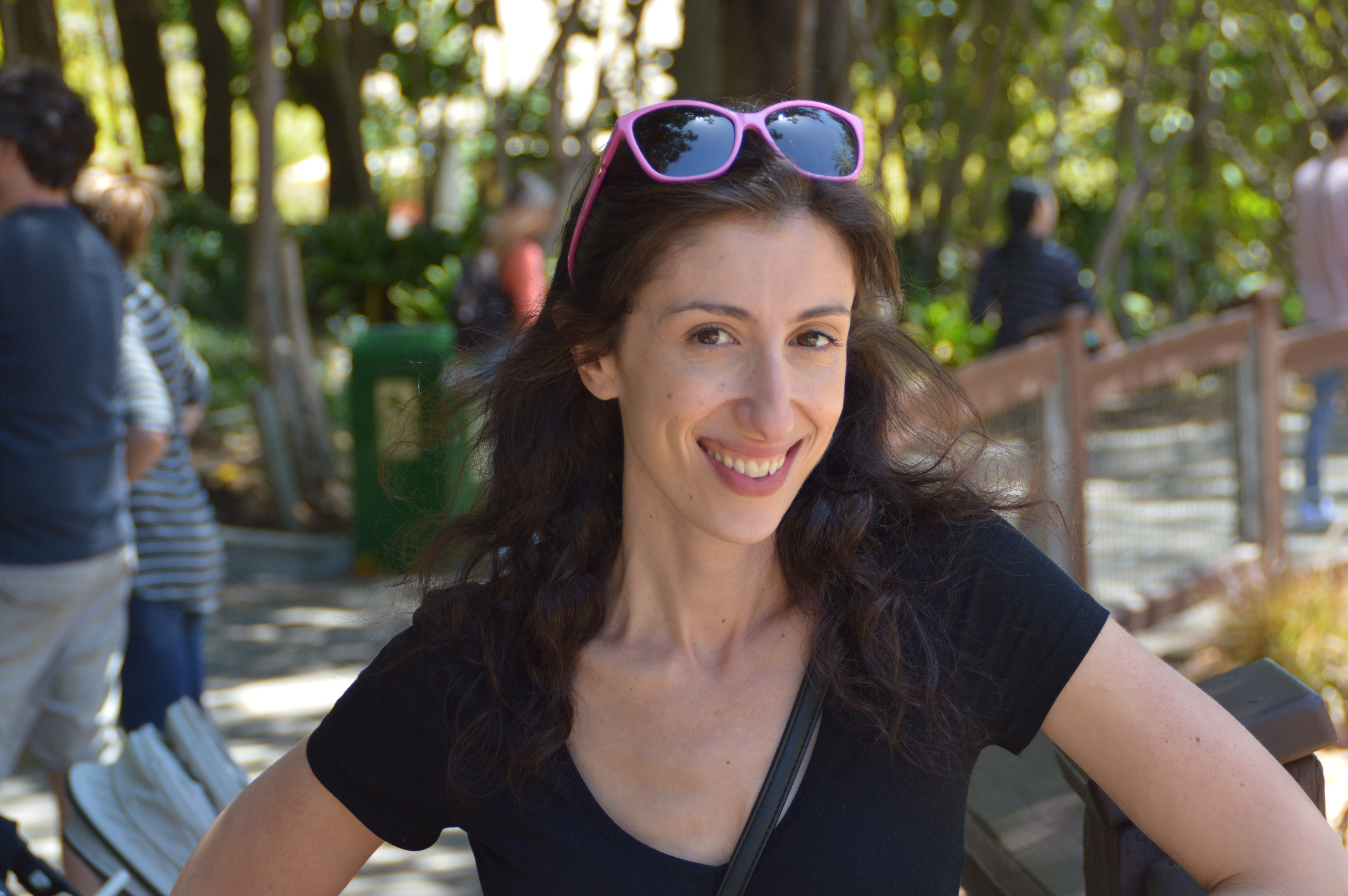 תמונה משפחתית בטיול משפחתי בלוס אנג'לס